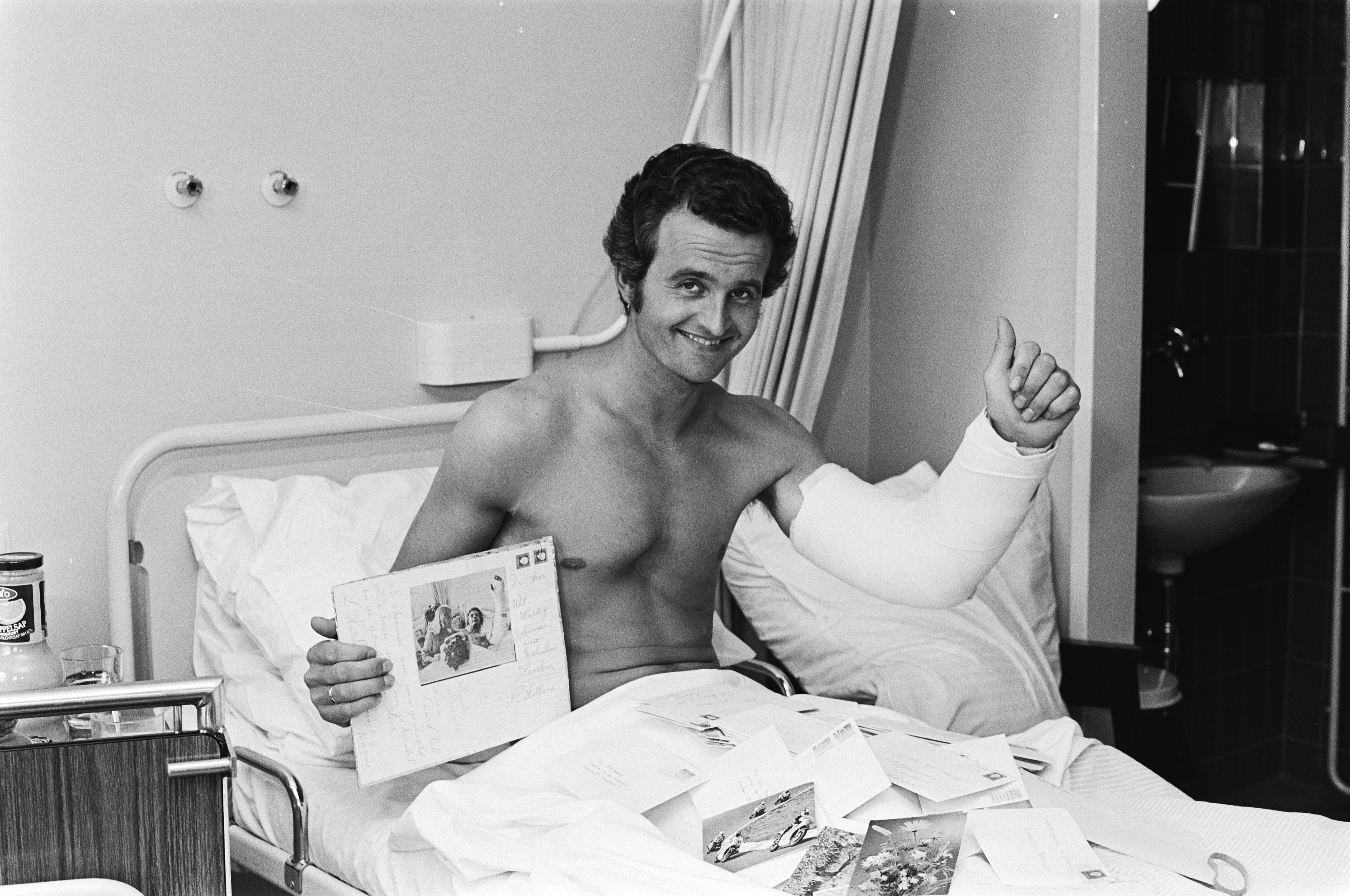 Collectie / Archief : Fotocollectie Anefo Reportage / Serie : Motorcoureur Wil Hartog in het ziekenhuis met een gebroken arm Beschrijving : ziekenhuizen, motorsport Datum : 5 april 1979 Trefwoorden : motorsport, ziekenhuizen Persoonsnaam : Hartog, Wil Fotograaf : Dijk, Hans van / Anefo Auteursrechthebbende : Nationaal Archief Materiaalsoort : Negatief (zwart/wit) Nummer archiefinventaris : bekijk toegang 2.24.01.05 Bestanddeelnummer : 930-2028